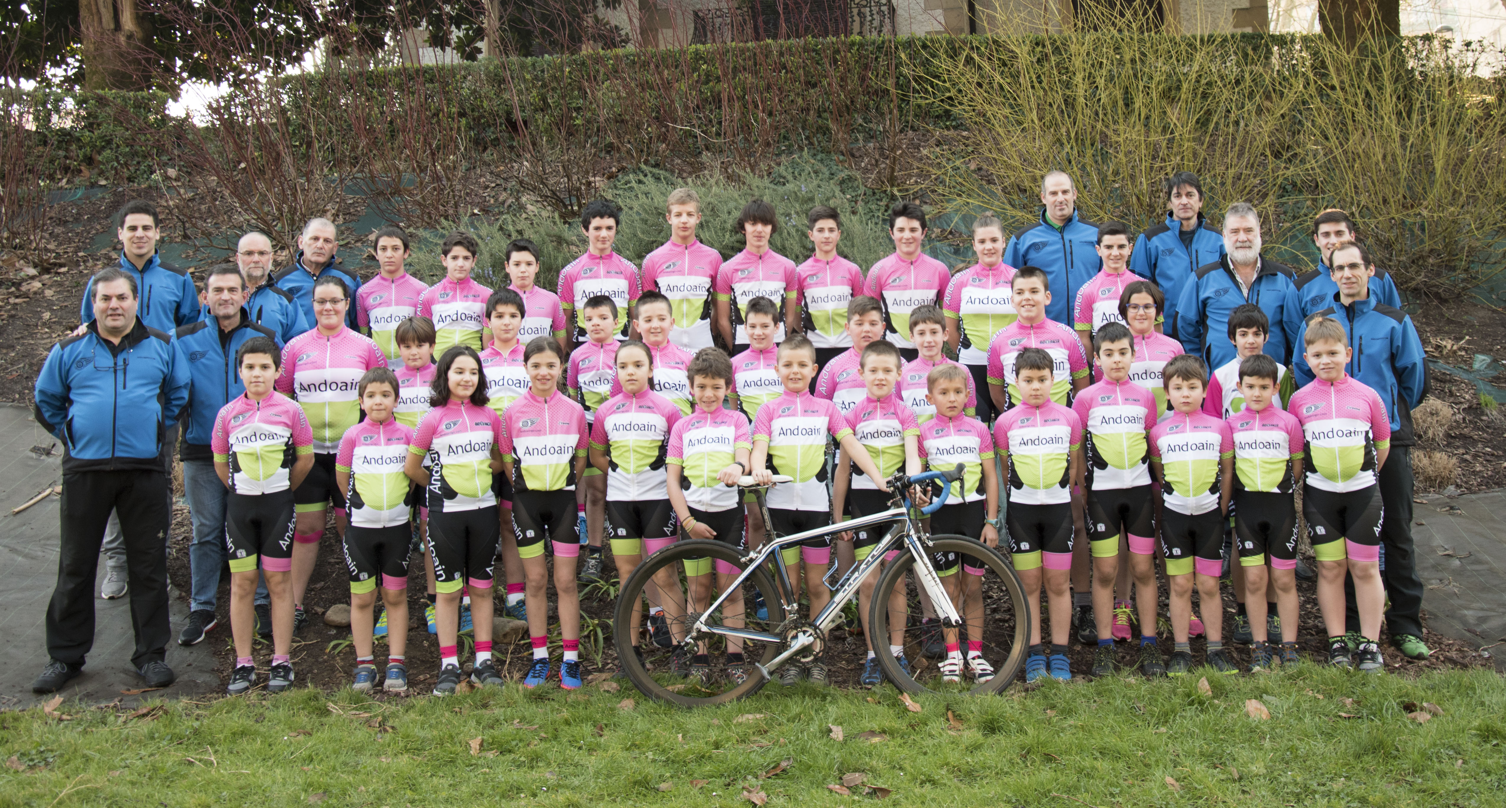 2017ko taldea